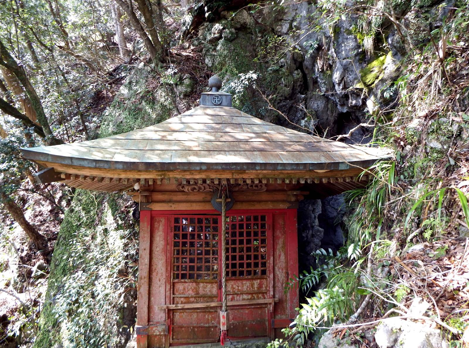 氷柱観音で、堂の右側にある